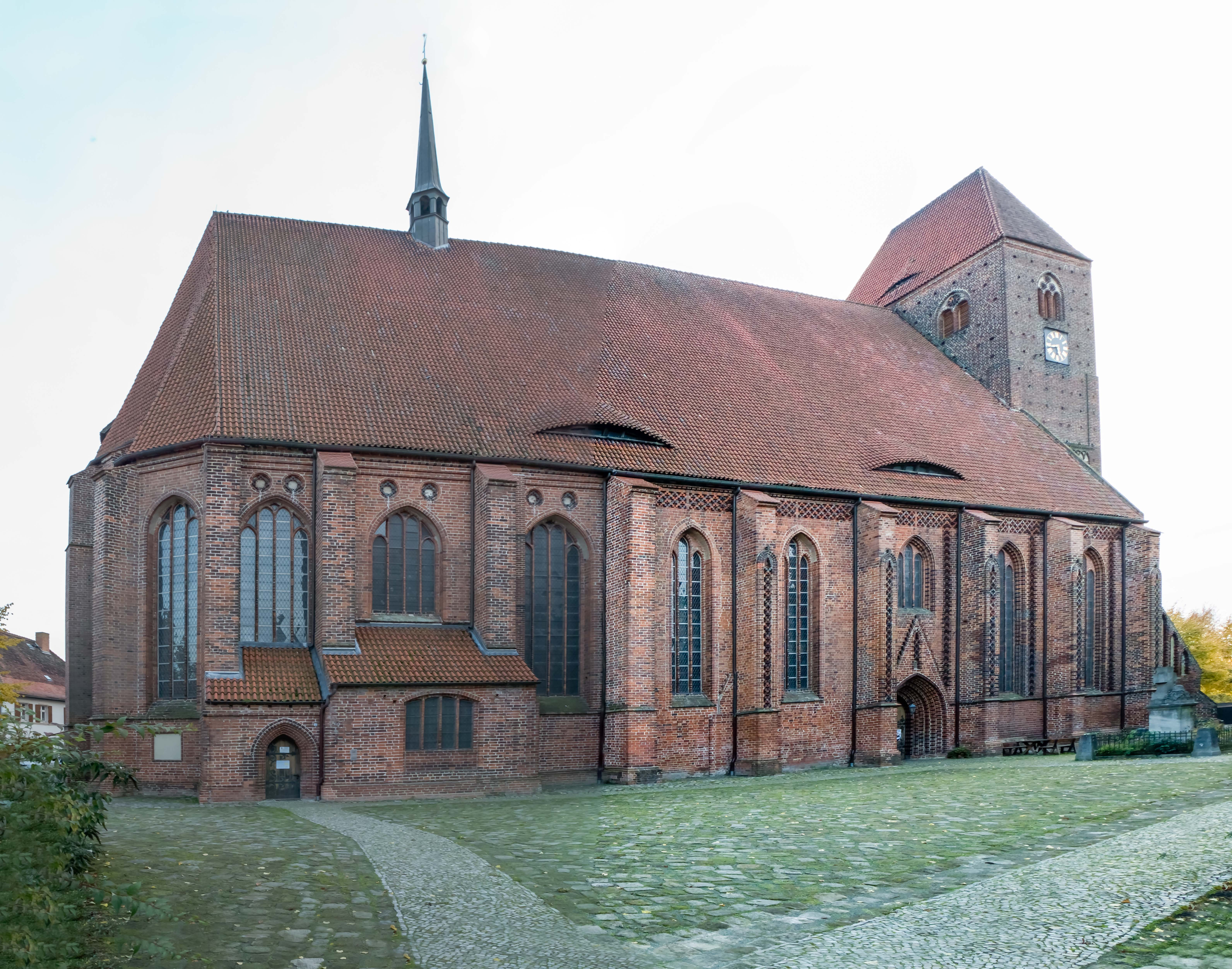 St. Johannes, auf dem Kirchplatz in Werben (Elbe)